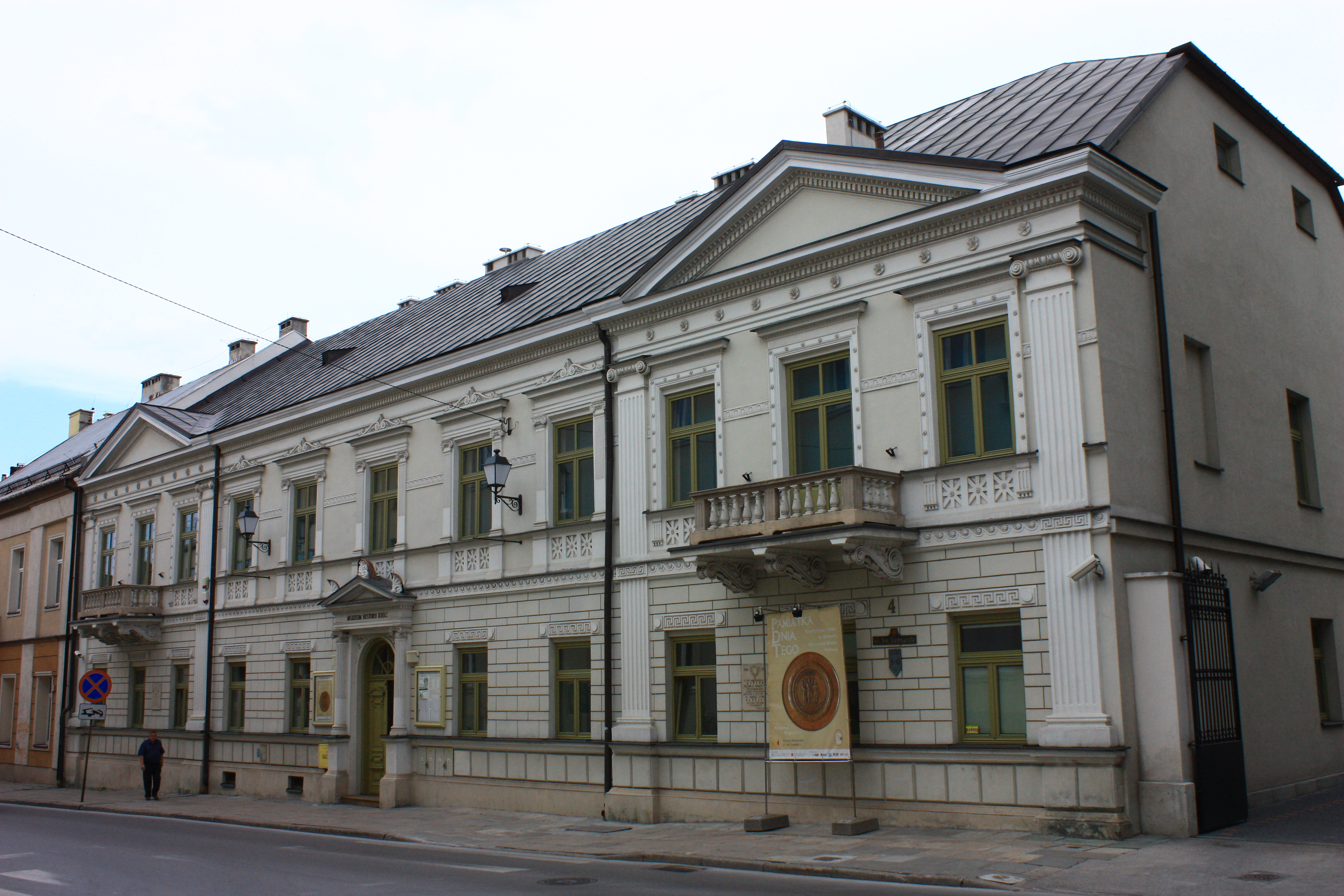 Kielce, dom, 2 poł. XIX w.